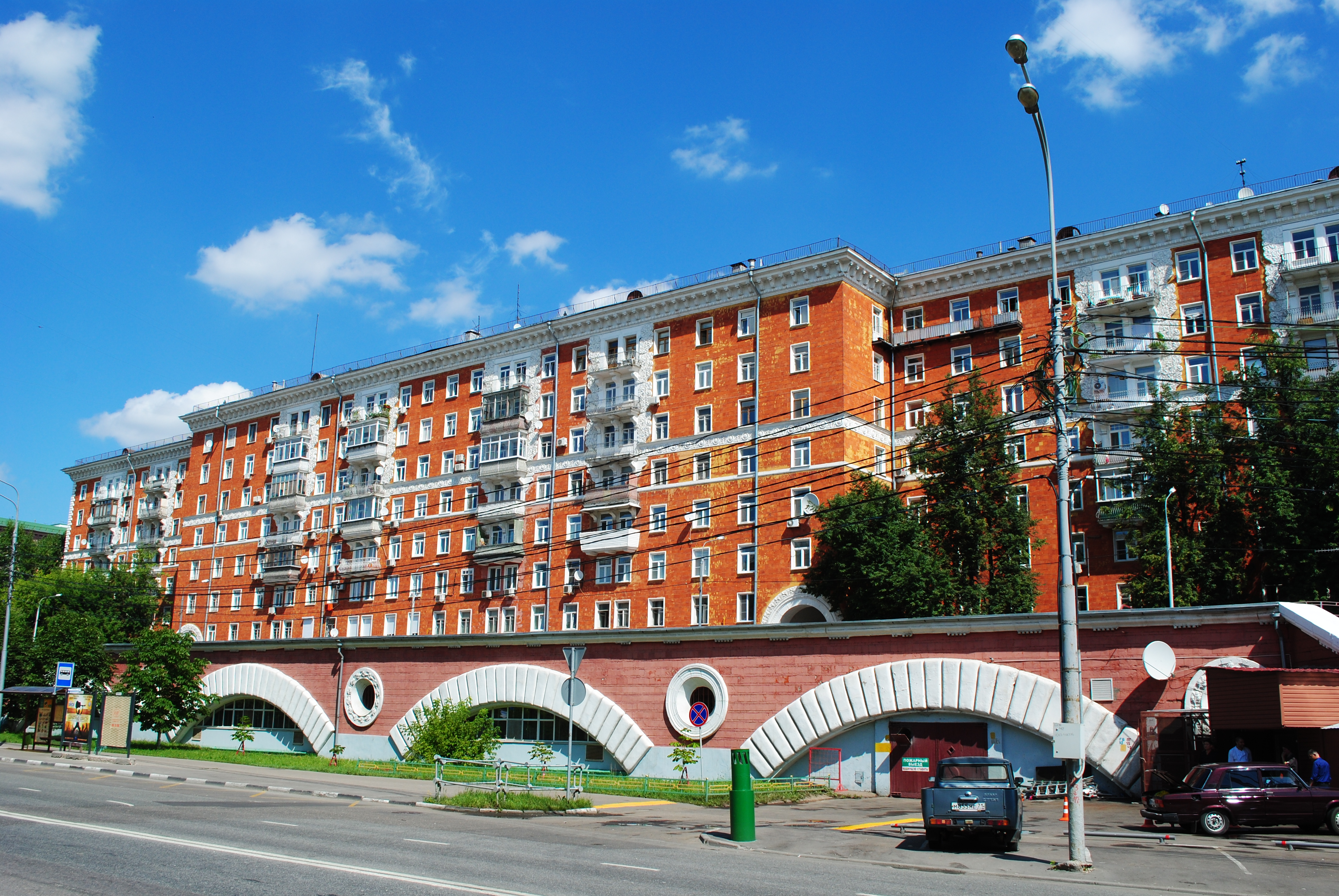 «Красные дома» (гараж и д. 6)